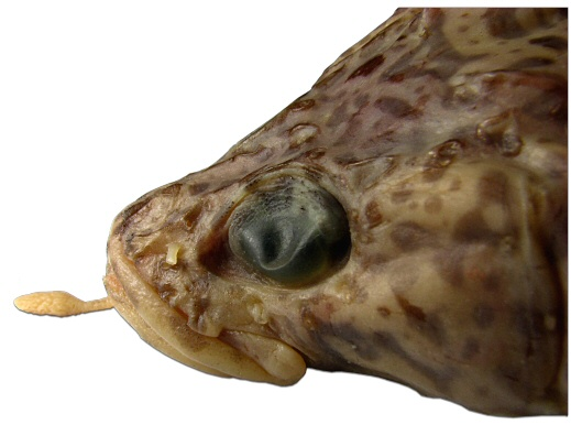 Pogonophryne marmorata (mental barbel), female, 180 mm TL